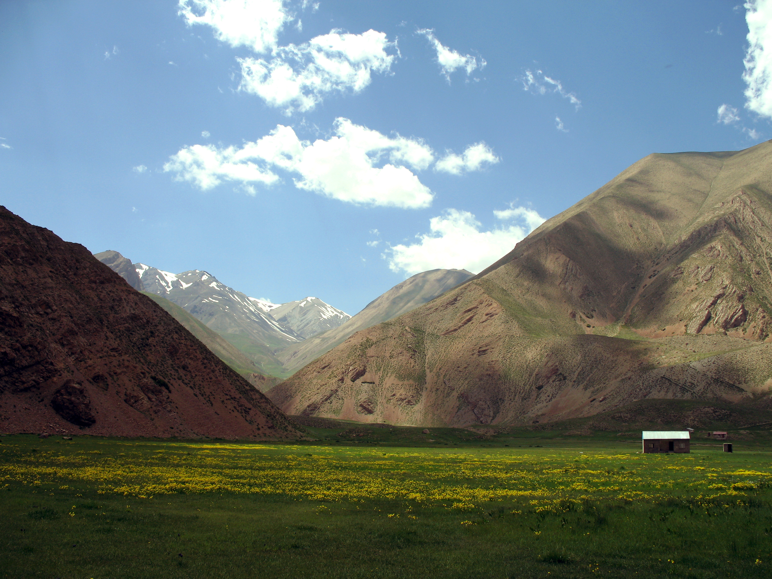 Namarestagh, Iran.